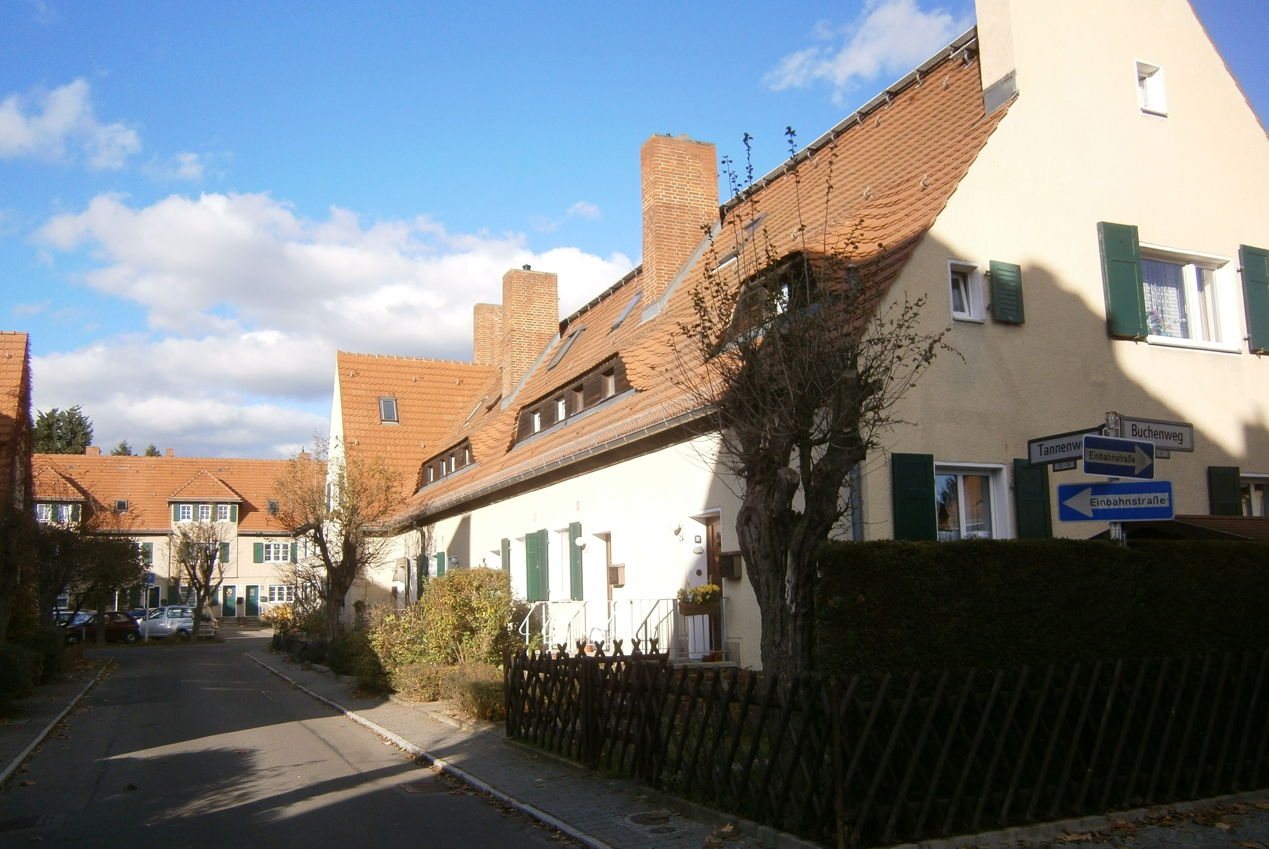 Tannenweg ist eine Straße im Berliner Ortsteil Hakenfelde.